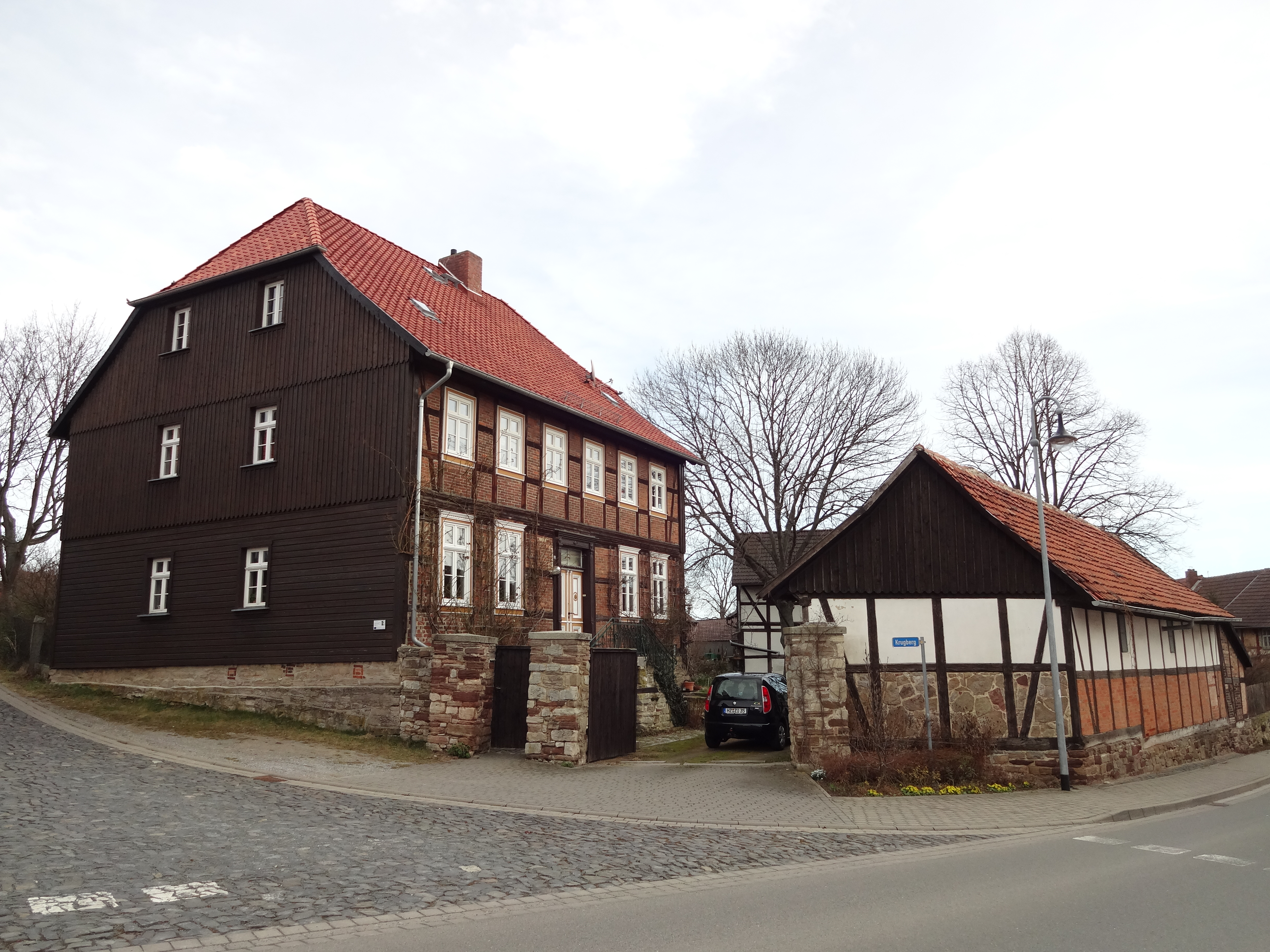 Kulturdenkmal in Minsleben, Ortsteil von Wernigerode